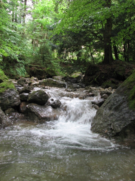 Le Grand Journans a les caractéristiques d'un torrent dans la première partie de son cours.